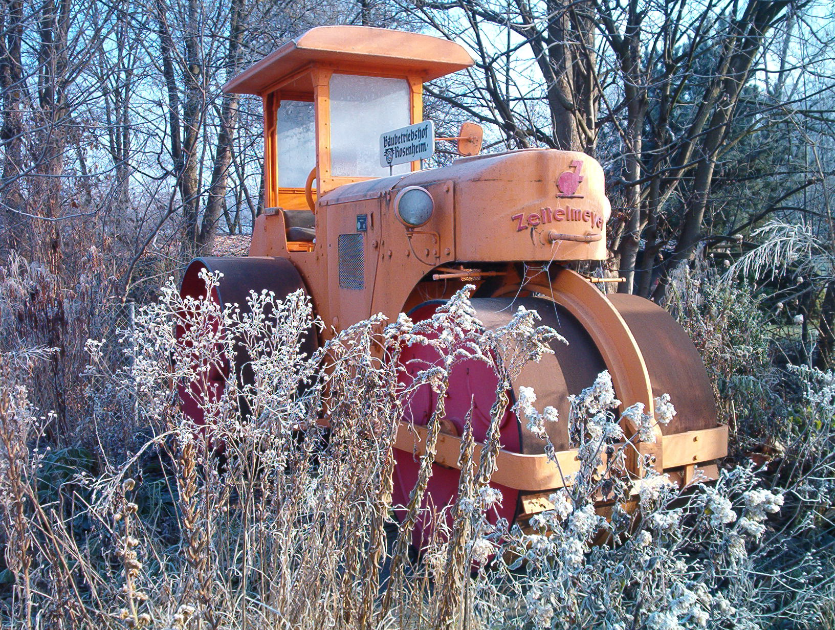 Straßenwalze der Firma Zettelmeyer